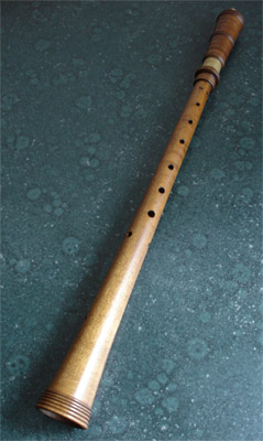 Rauschpfeife soprano, Eric A. Moulder Source : Rabusier Licence